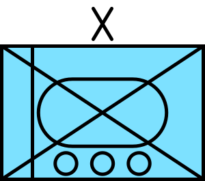 Taktisches Teichen eines Stryker Brigade Combat Teams (US-Kampfbrigaden-Typ)